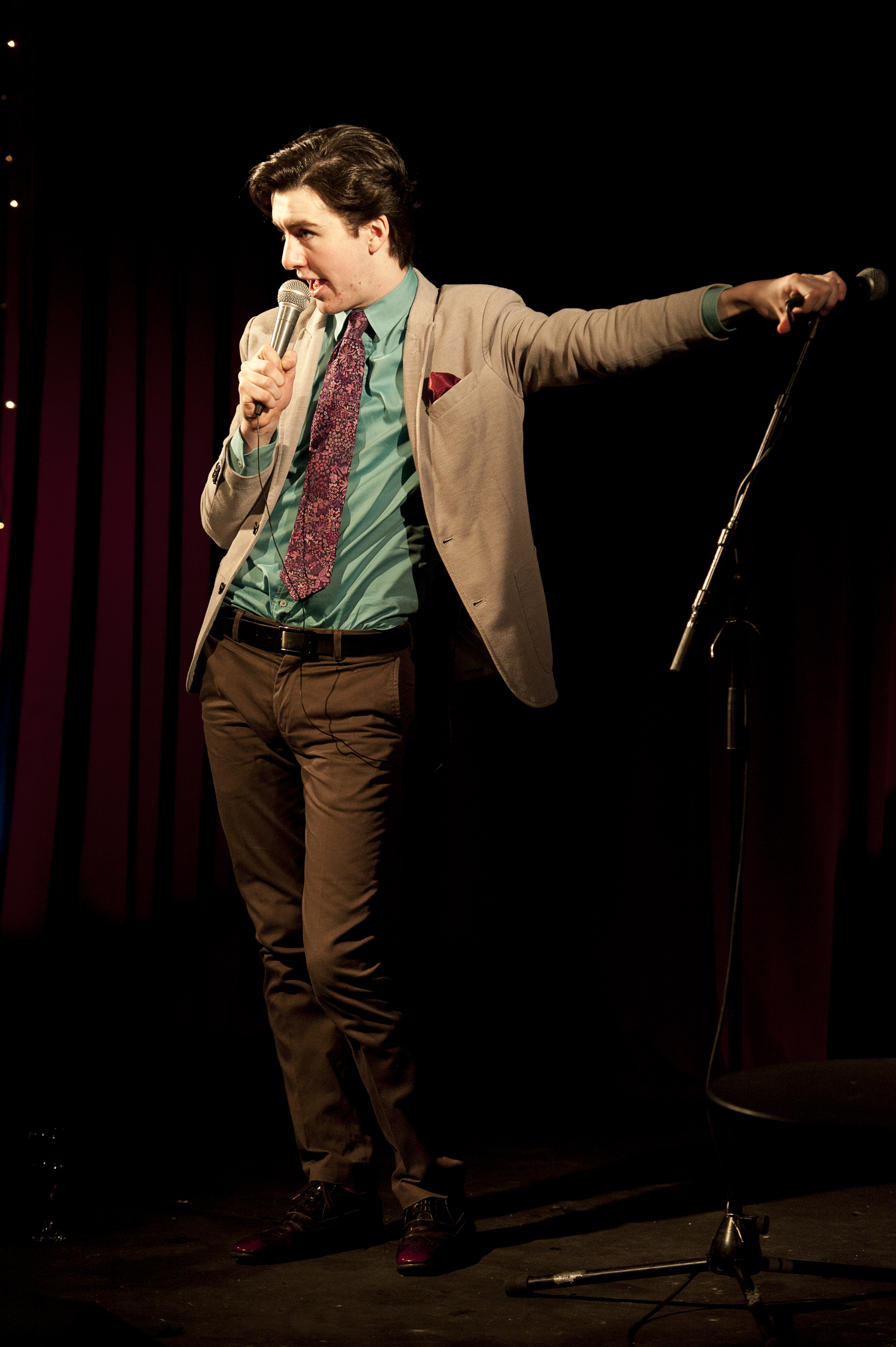 Al Porter